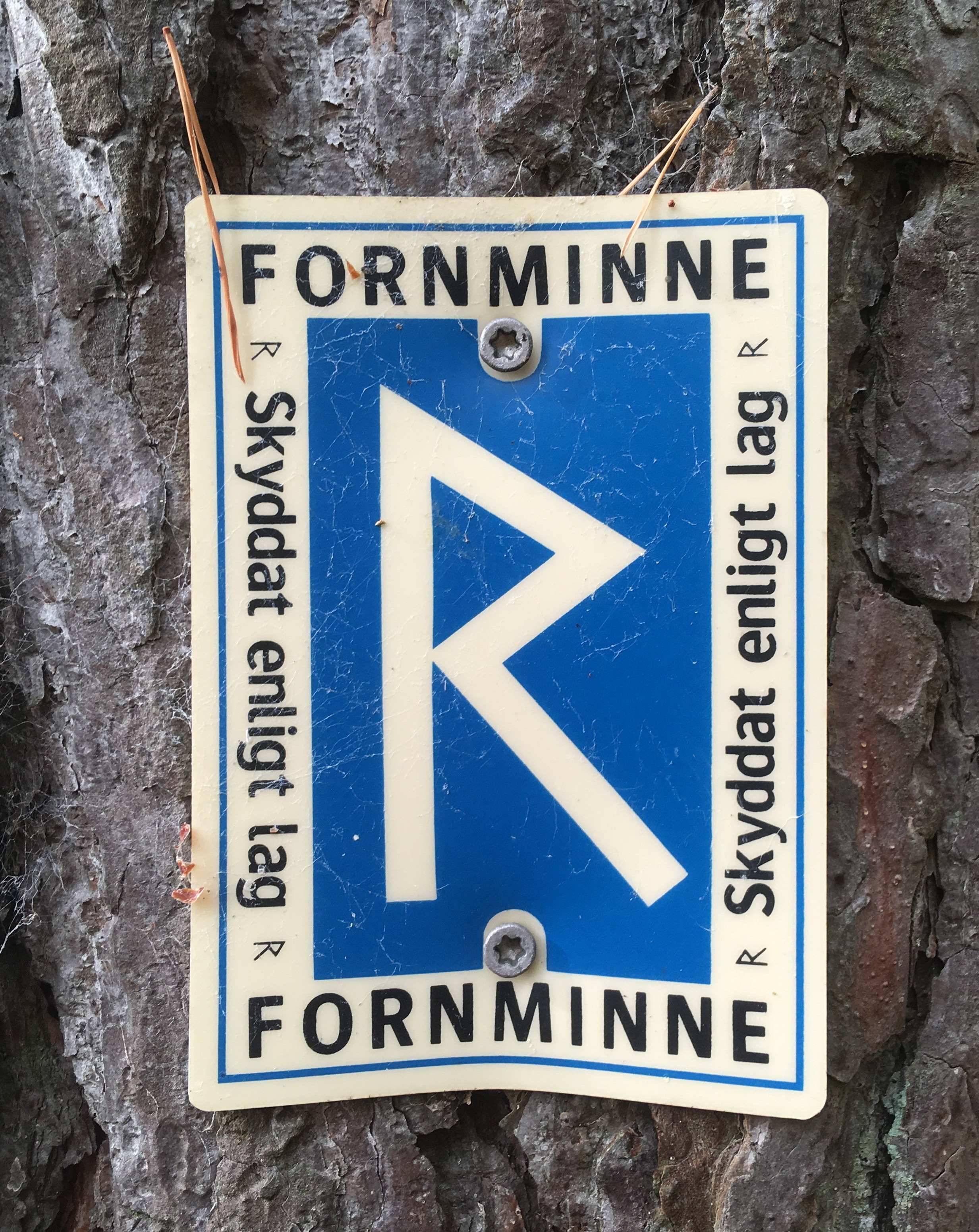 En svensk fornminnesmarkering på Ekerö